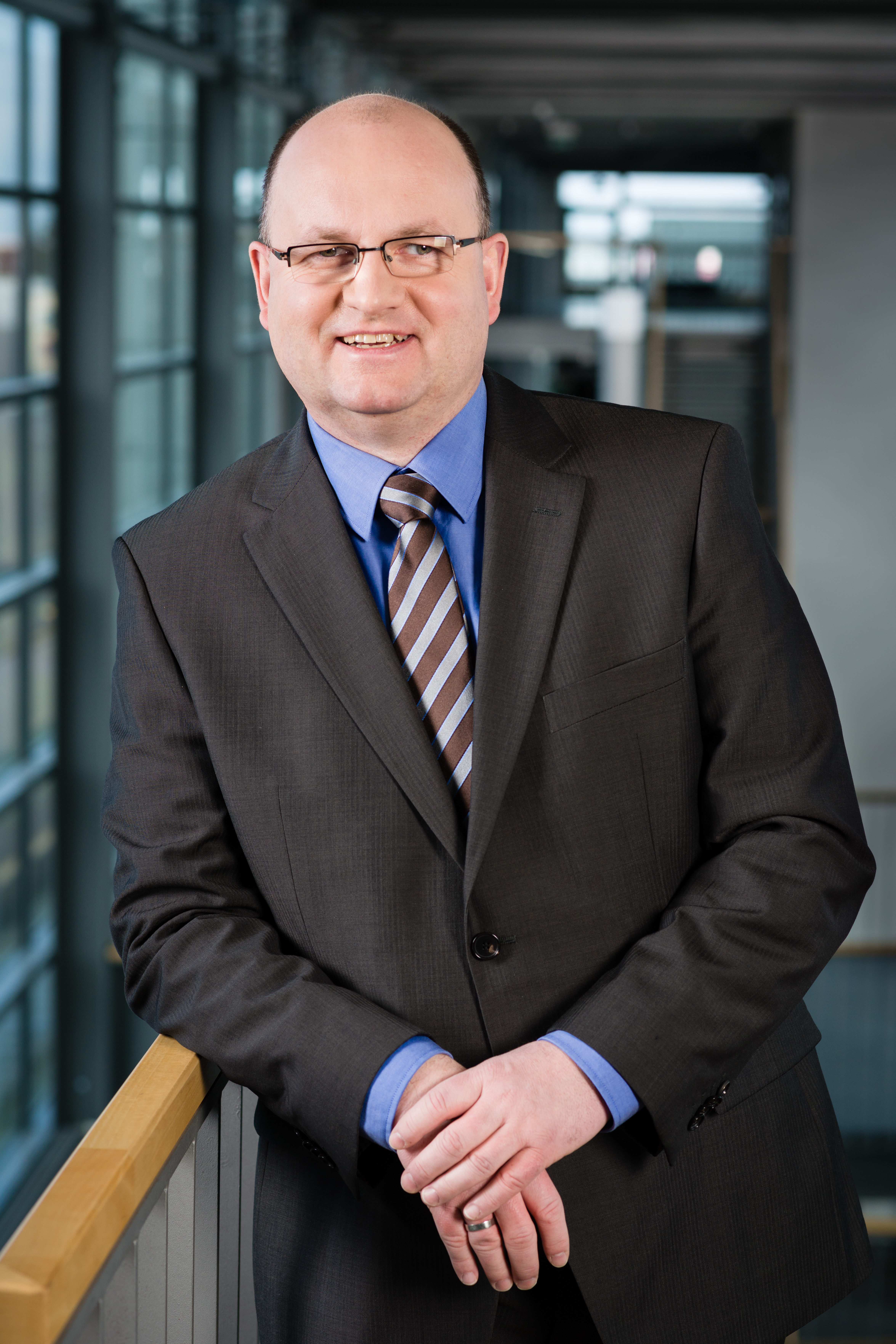 Prof. Dr. Peter Benner, Leiter der Fachgruppe Computational Methods in Systems and Control Theory. am Max-Planck-Institut für Dynamik komplexer technischer Systeme / 2014